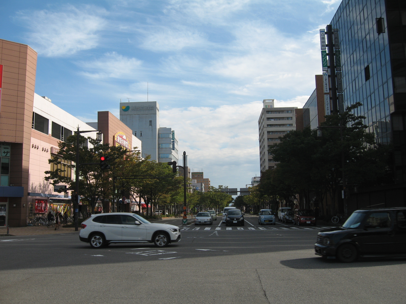 新潟市弁天橋通の画像。